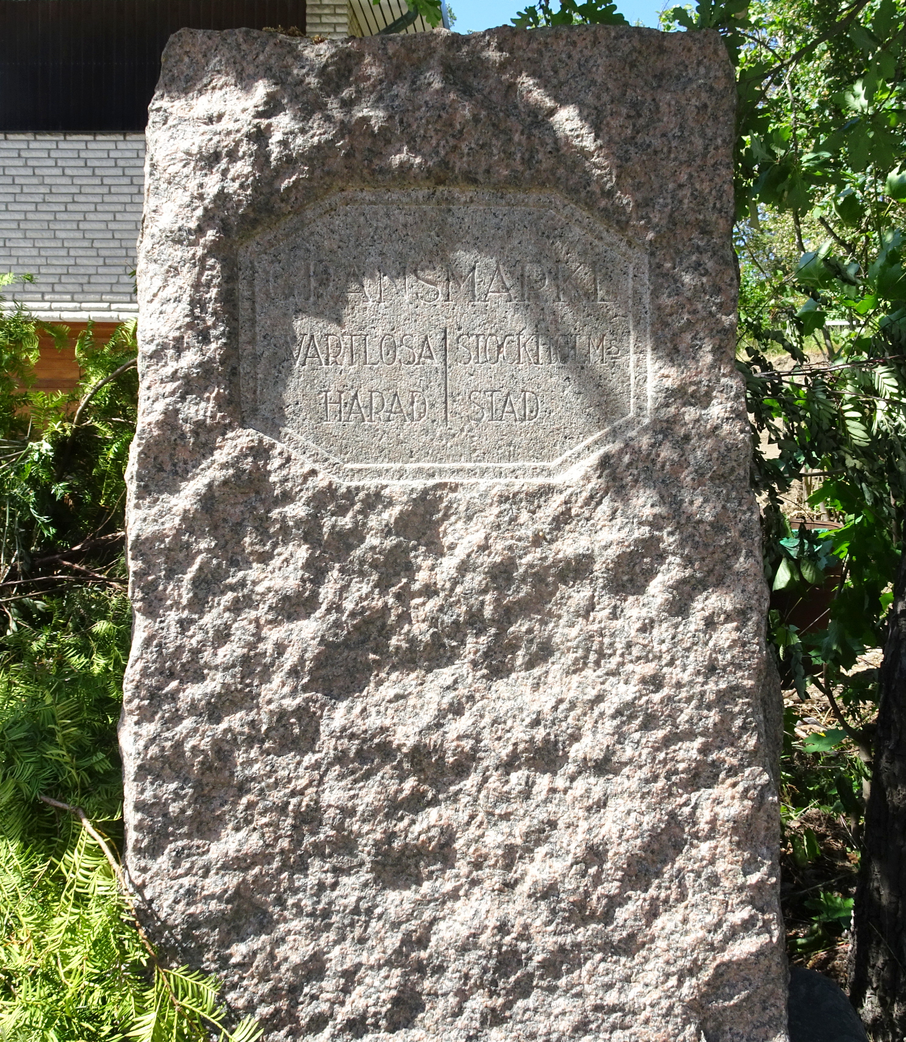 Gamla Södertäljevägen gränsmärke RAÄ-nummer Brännkyrka 148:1 Text: GRÄNSMÄRKE SVARTLÖSA HÄRAD STOCKHOLMS STAD